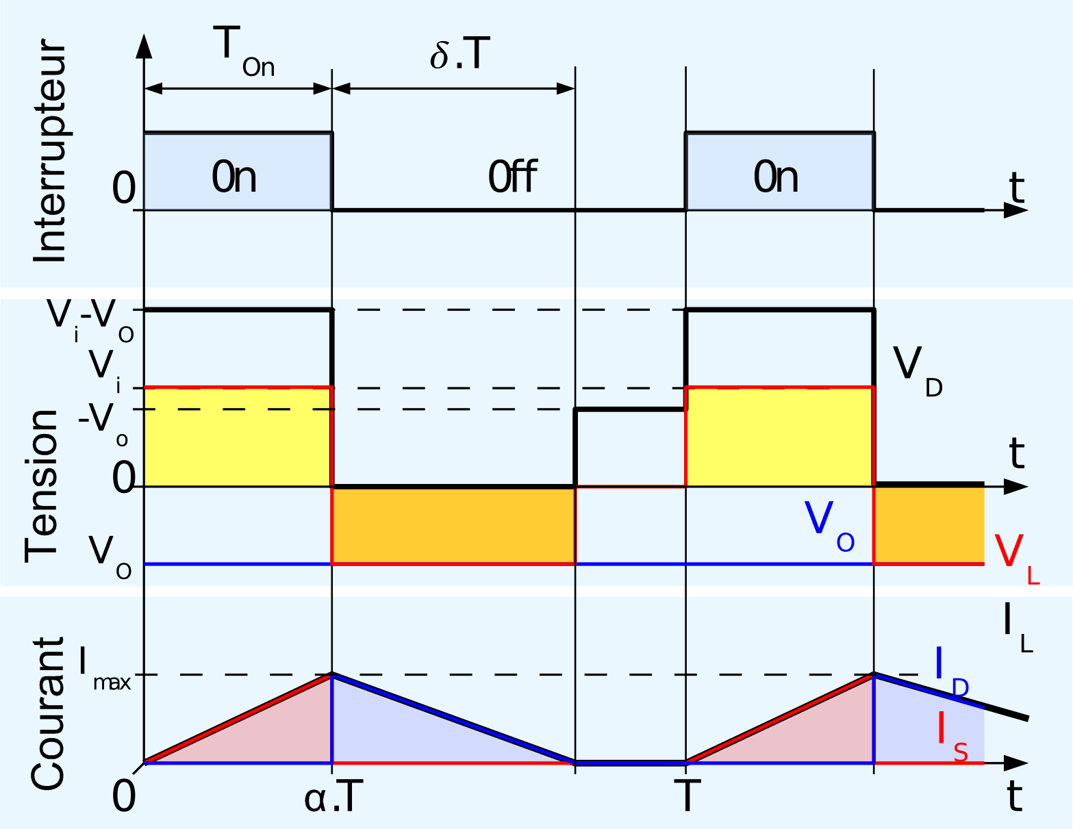 == traduction en français == ajout du paramètre 'alpha'